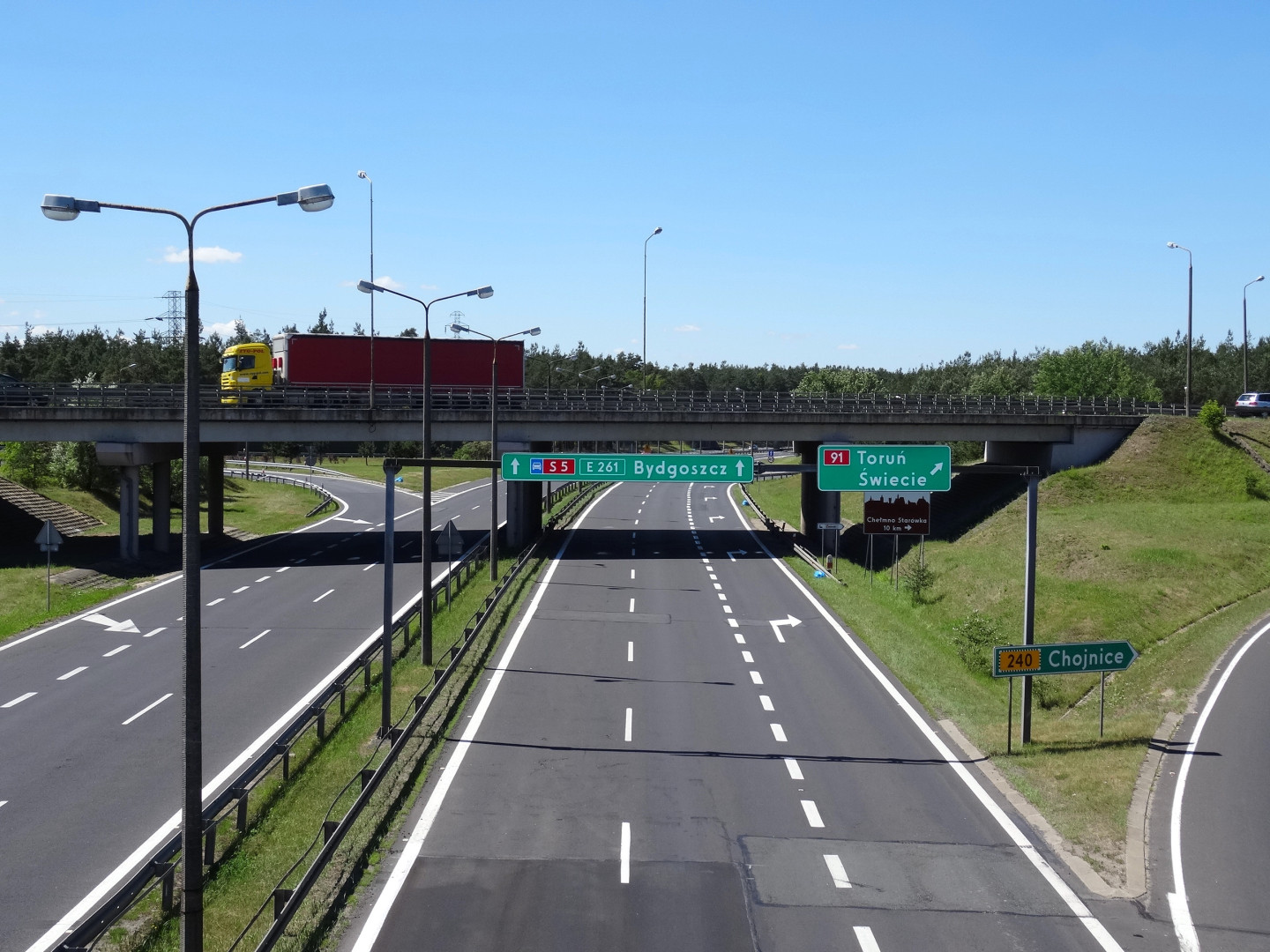 Droga ekspresowa S5, obwodnica Świecia